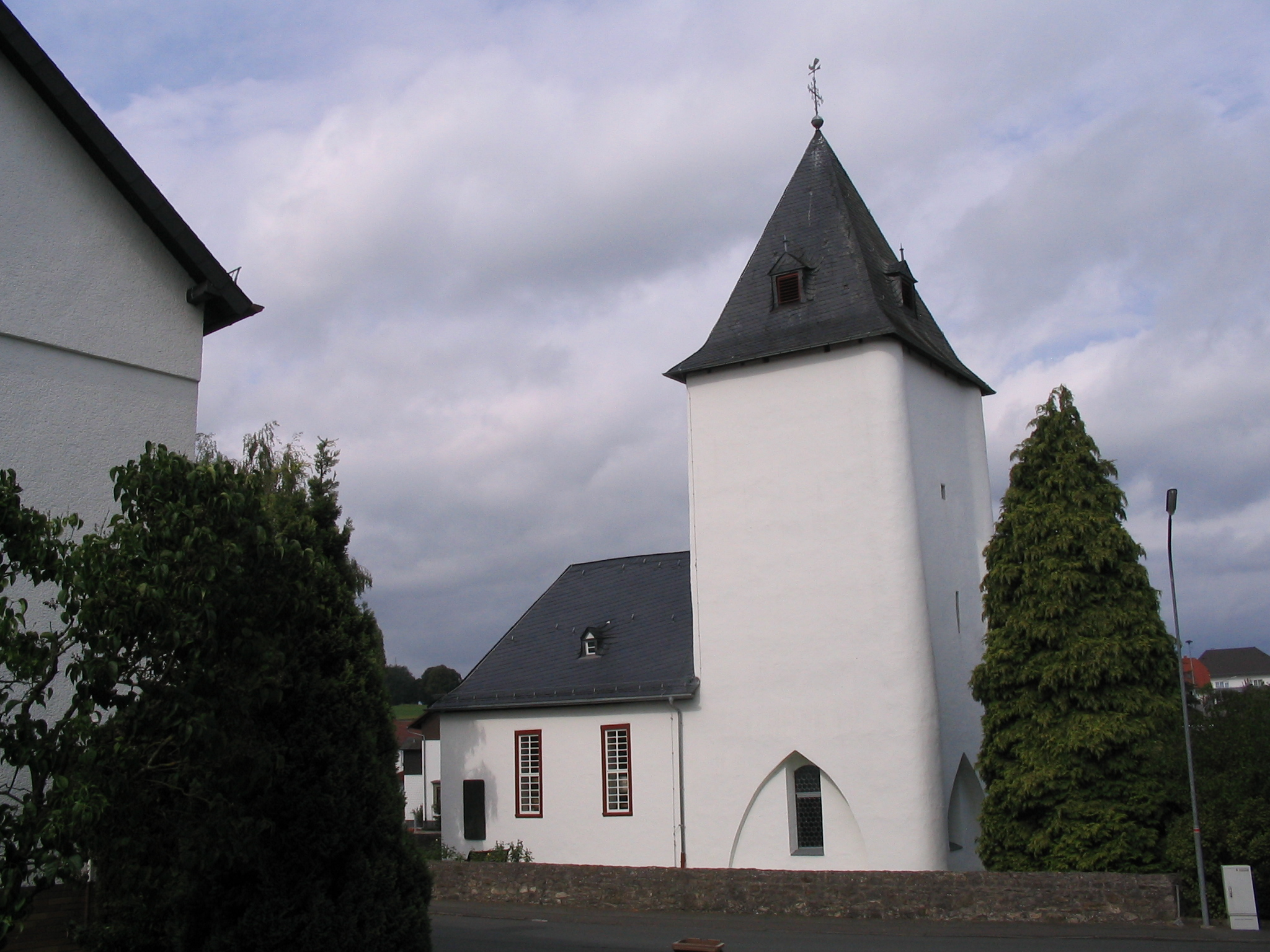 Kirche in Ehringshausen-Daubhausen (Hessen, Deutschland)